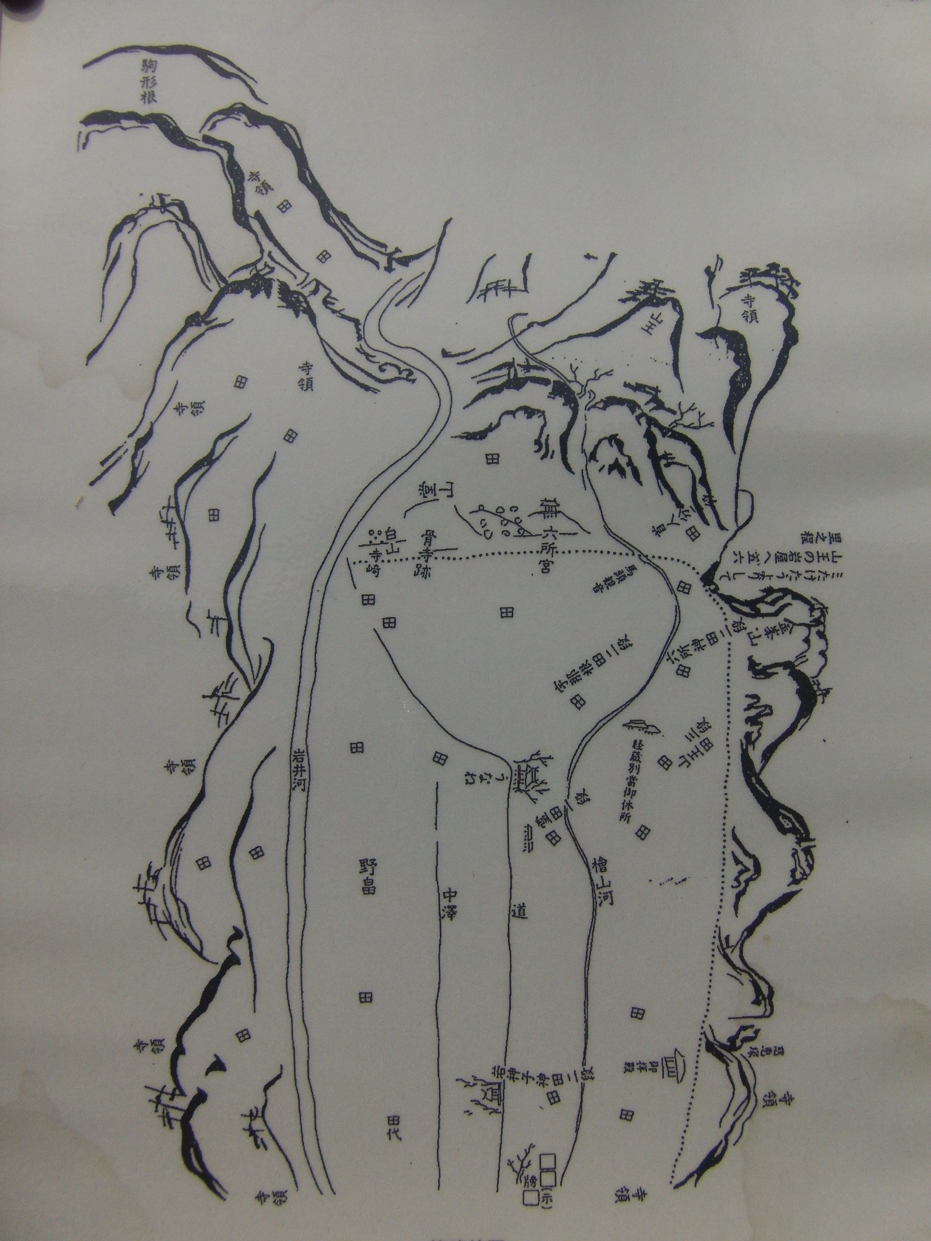 奥州藤原氏が滅んだ1189年からさほど経過していない時期に描かれた骨寺村荘園の絵図のトレース（本寺地区の解説版掲示物）、原本は重要文化財 ここに描かれた様子が現代でも殆ど変らない